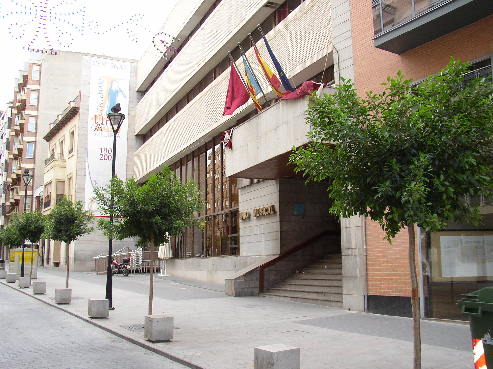 Valencia. (Comunidad Valenciana. España) Liria. Sede de la Unión Musical. Fotografía realizada el 24 septiembre de 2006 por el autor. User:Pelayo2